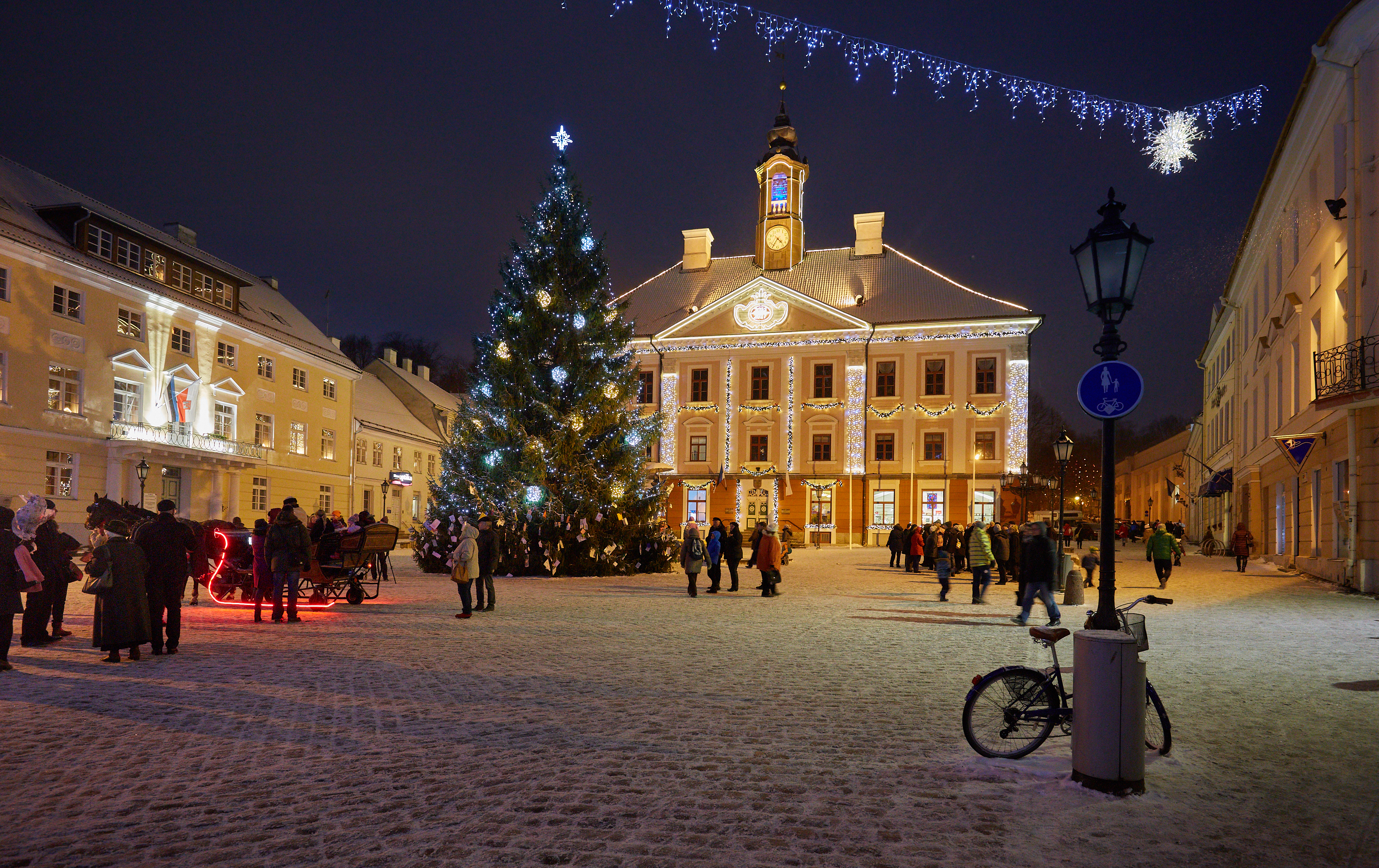 Tartu Raekoda 2016. aasta detsembris